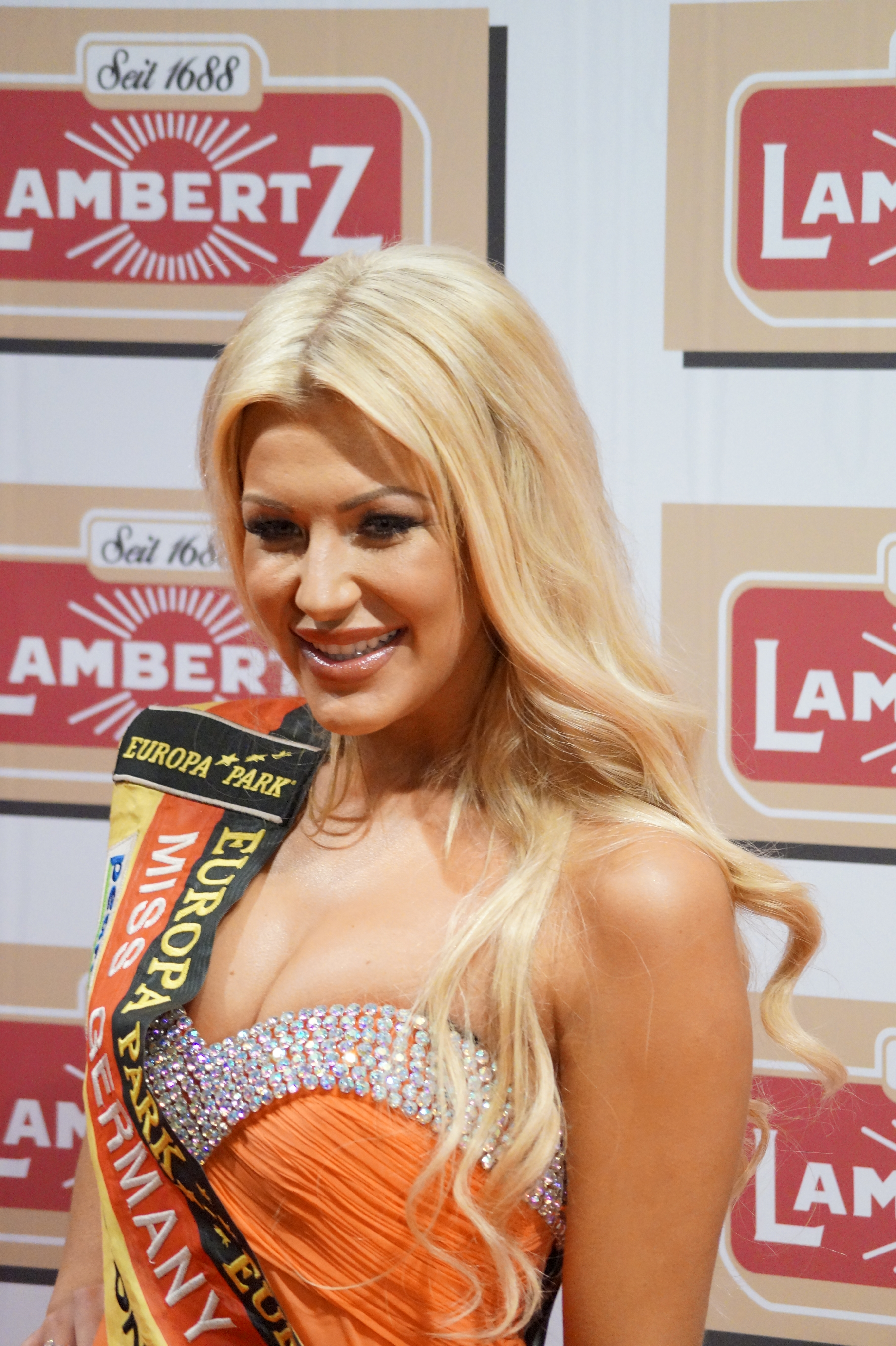 "Lambertz Monday Night 2015" im "Alten Wartesaal" in Köln, am 02.02.2015.